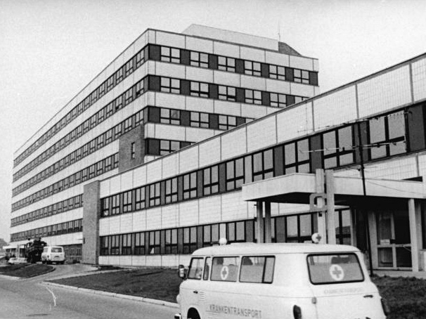 Factual corrections and alternative descriptions are encouraged separately from the original description. Additionally errors can be reported at this page to inform the Bundesarchiv. Original historic description: Greifswald, neues Universitätsklinikum ADN-ZB Sindermann 20.2.89 Bez. Rostock: Wahlvorbereitung- Zwischen Stadtkern und Neubaugebieten wurde das neue Klinikum am Bereich Medizin der Ernst-Moritz-Arndt-Universität Greifswald erbaut. In dem sechstöckigen Neubaukomplex befinden sich 150 ärztliche Arbeitsplätze für die ambulante Behandlung in sechs klinischen Fachrichtungen sowie die Betriebsambulanz der Universität. Für die Behandlung der Patienten, die auch aus angrenzenden Kreisen der Bezirke Rostock und Neubrandenburg kommen, stehen modernste medizinische Geräte und apparaturen zu Verfügung. So ist eine breit gefächerte Diagnostik auf Gebieten wie Chirurgie, Orthopädie, Innerer Medizin und Gynäkologie möglich.